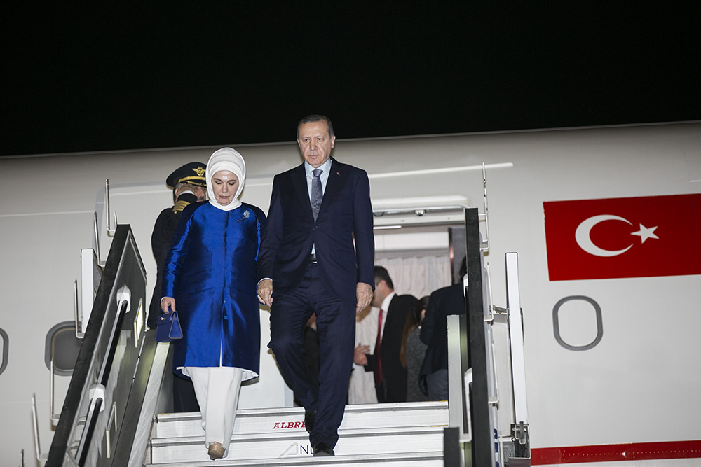 Quito (Ecuador), 03 de febrero de 2016. El Presidente de Turquía Recep Tayyip Erdogan arribó a la capital en su primera visita oficial. Foto: Luis Astudillo C. / Cancillería